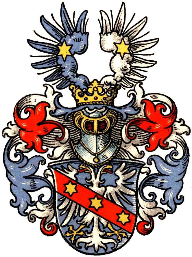 Wappen derer von Ploennies